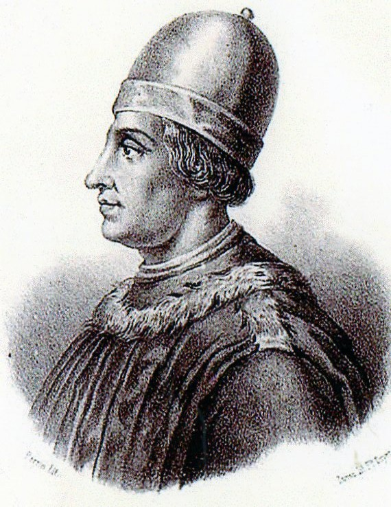 ritratto del condottiero Braccio da Montone